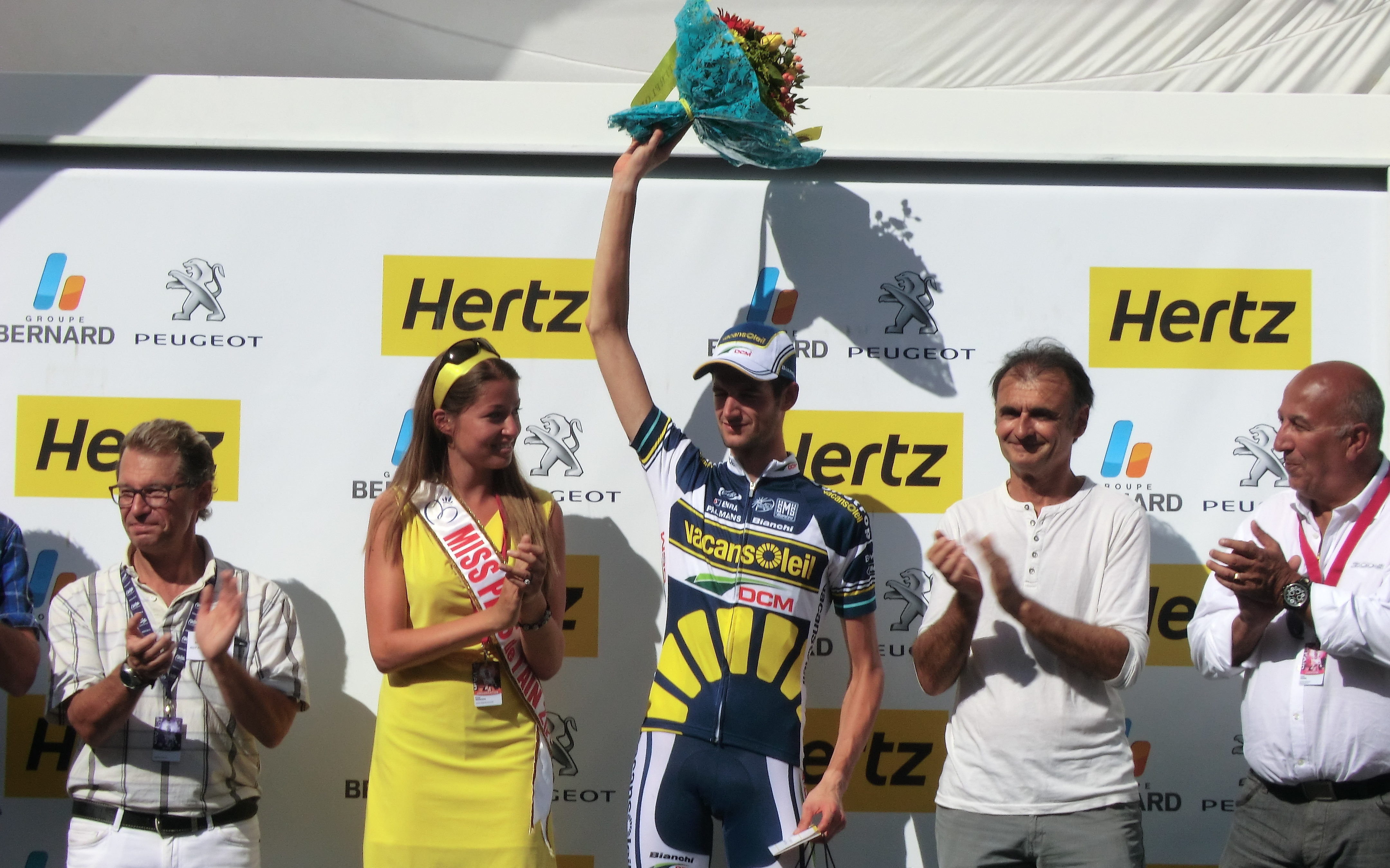 Podiums du Tour de l'Ain 2013, à l'issue de la dernière étape à Belley.